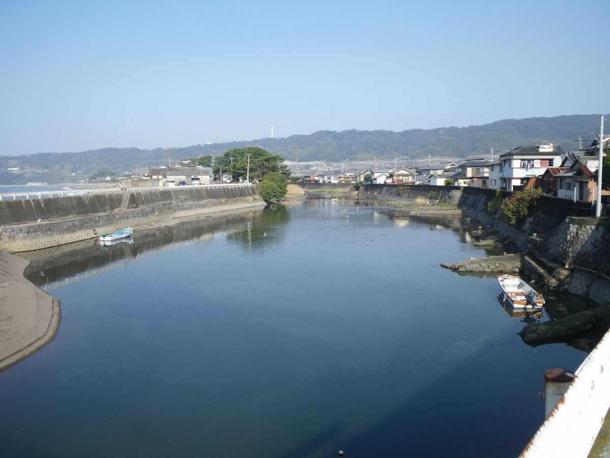 千々石川下流。千々石海水浴場の奥で南下する。画像左端は千々石海水浴場・橘湾。水面にいる白い点はウミネコの群れ。長崎県雲仙市（Chijiwa river,Unzen,Nagasaki）